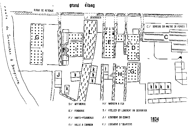 Plans des Forges de Dampierre-sur-Blévy, Eure-et-Loir (France).